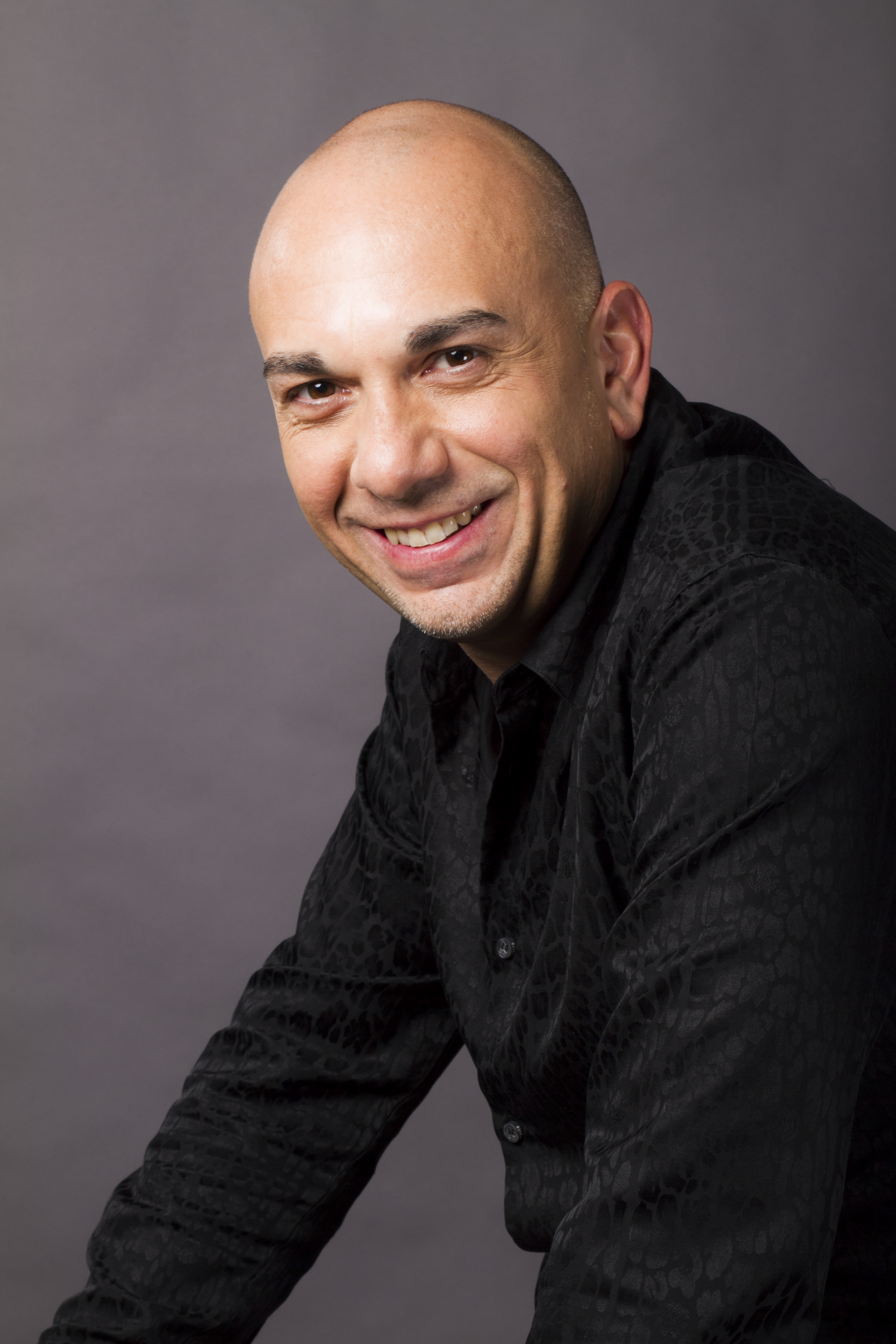 Founder of Planet Records